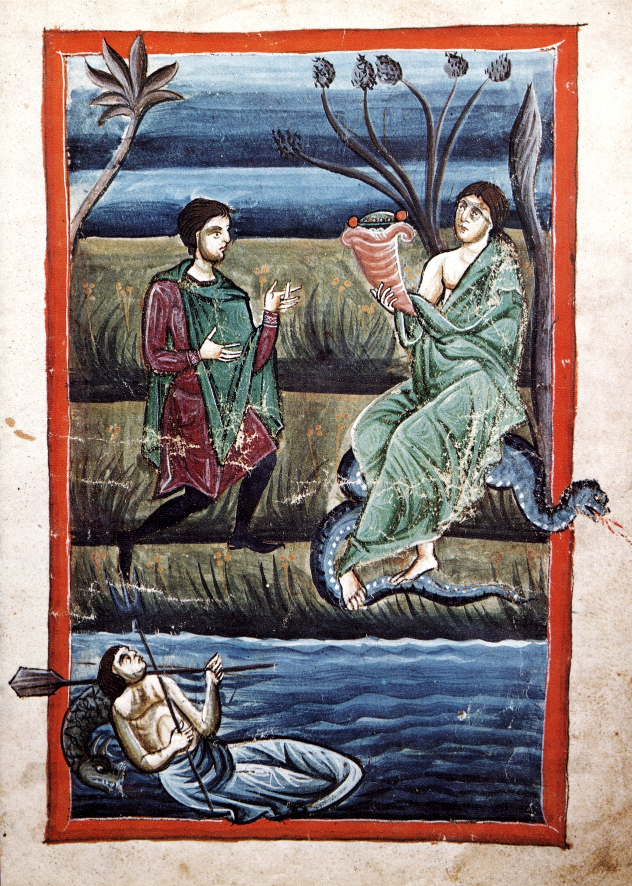 Illustration eines Anrufungsgedichtes an die göttliche Mutter Erde (Medicina antiqua, Codex Vindobonensis 93, fol. 9 recto).